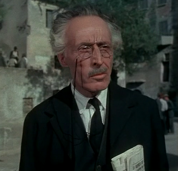 Scena dal film Amori di mezzo secolo